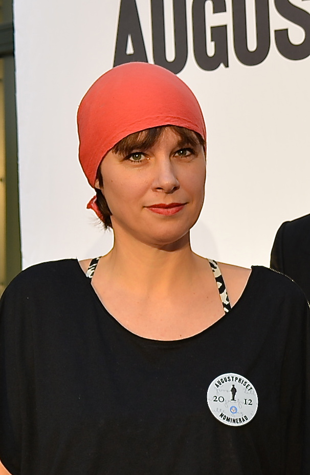 Augustprisnominerad i skönlitterära klassen den 22 oktober 2012.